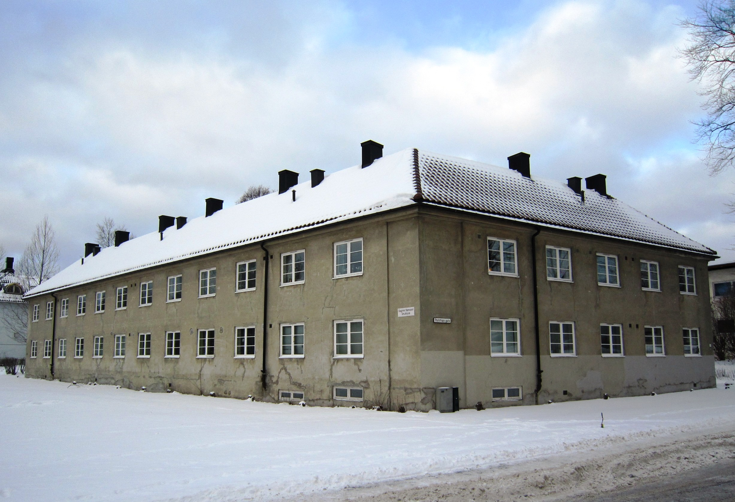 Eugene Hanssens småhjem i Thulstrups gate 2